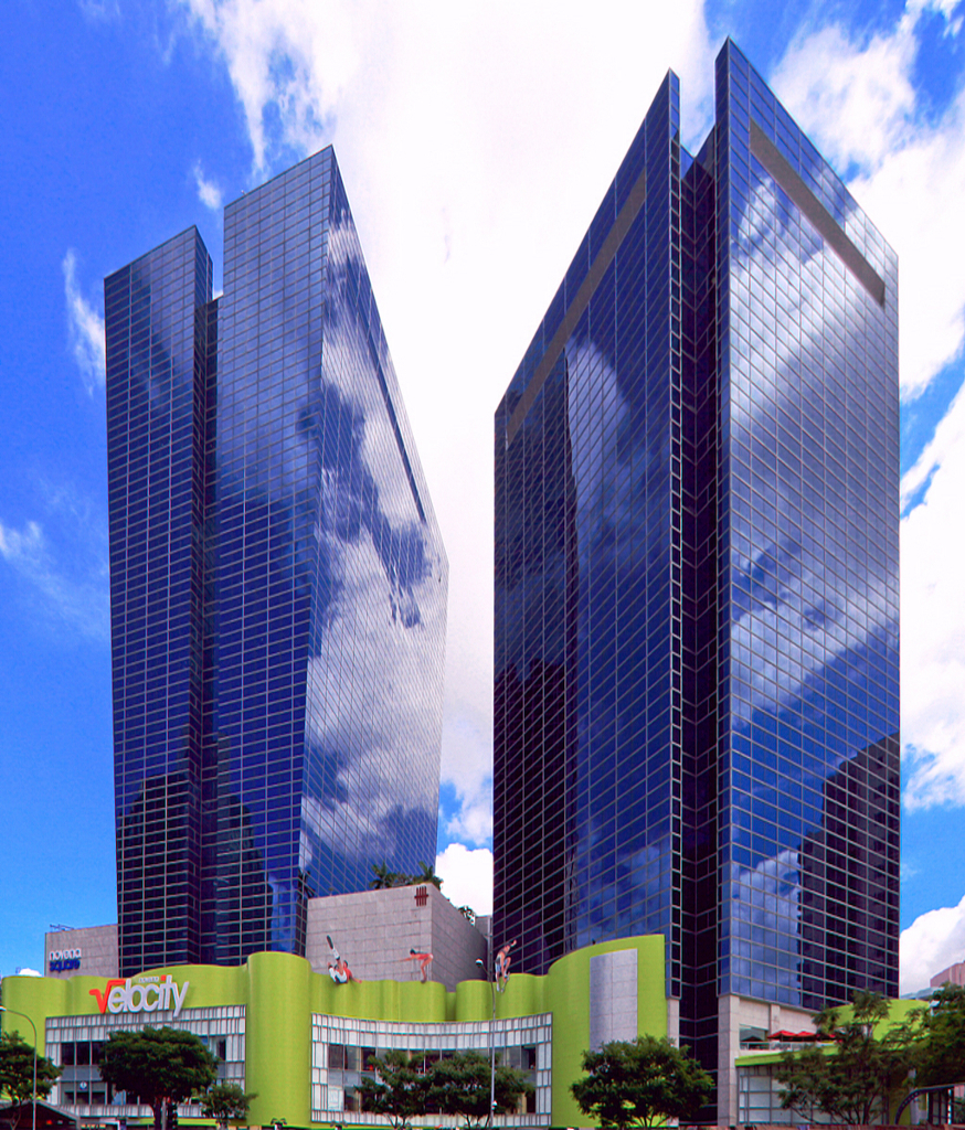 Novena Square, Singapore